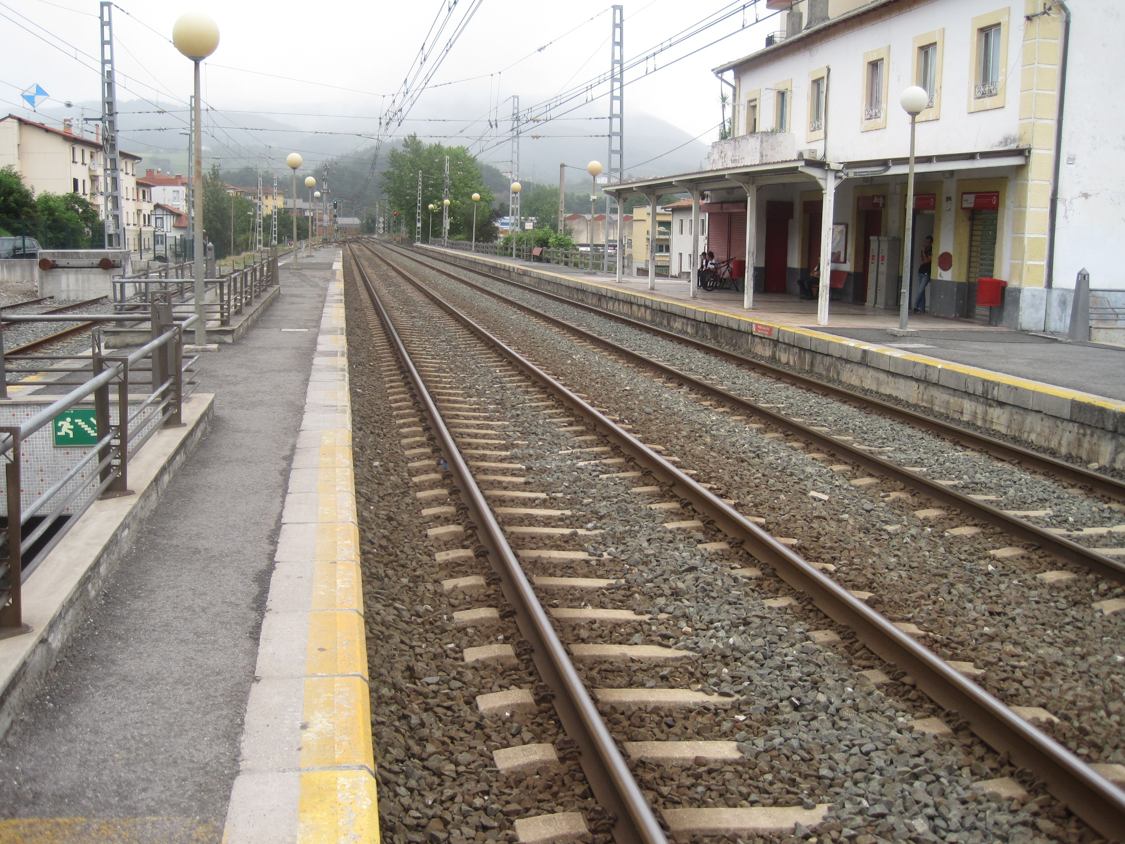 Vista de la estación